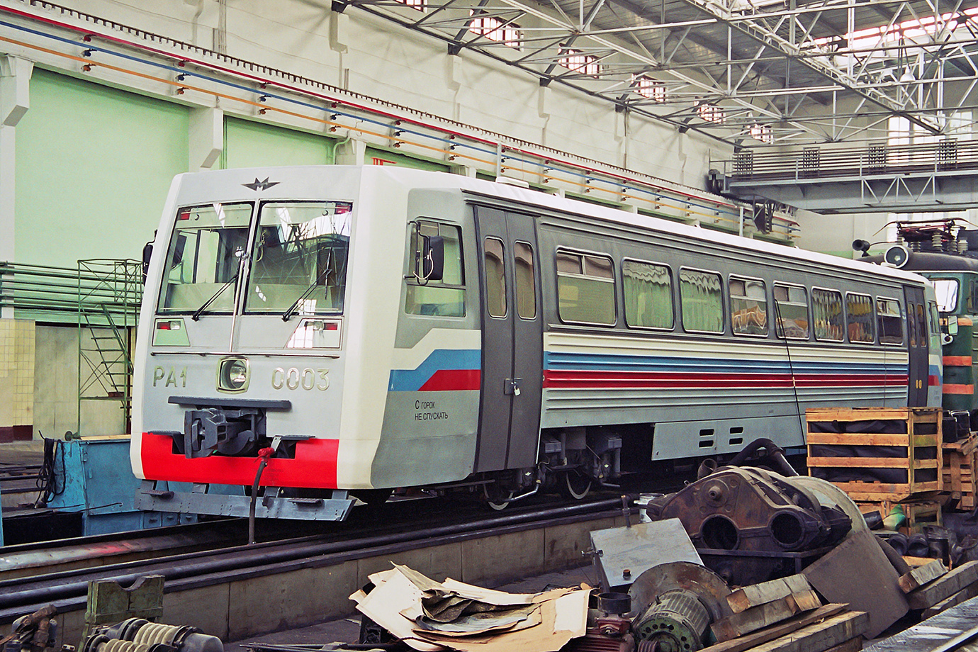 Модель 731.15 Опытный рельсовый автобус, построен в единственном экземпляре. Силовая установка — дизельный двигатель 6Д6Н "Барнаултрансмаш". Гидравлическая передача — "Метровагонмаш". В 2004-2005 гг. проходил испытания на ЭК ВНИИЖТ в Щербинке. Ныне находится на территории ОАО "Метровагонмаш".